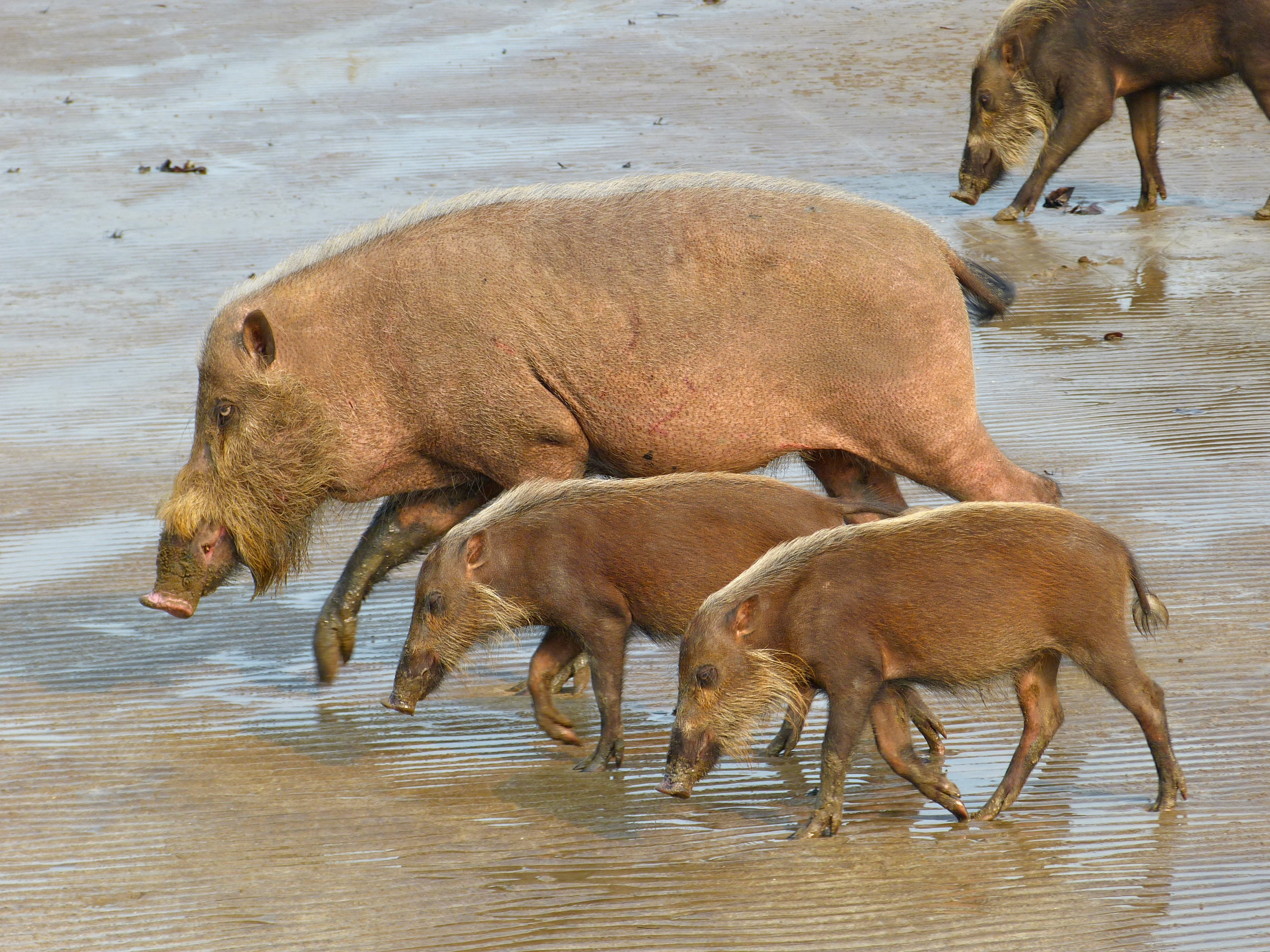 Bako NP, Sarawak, MALAYSIA